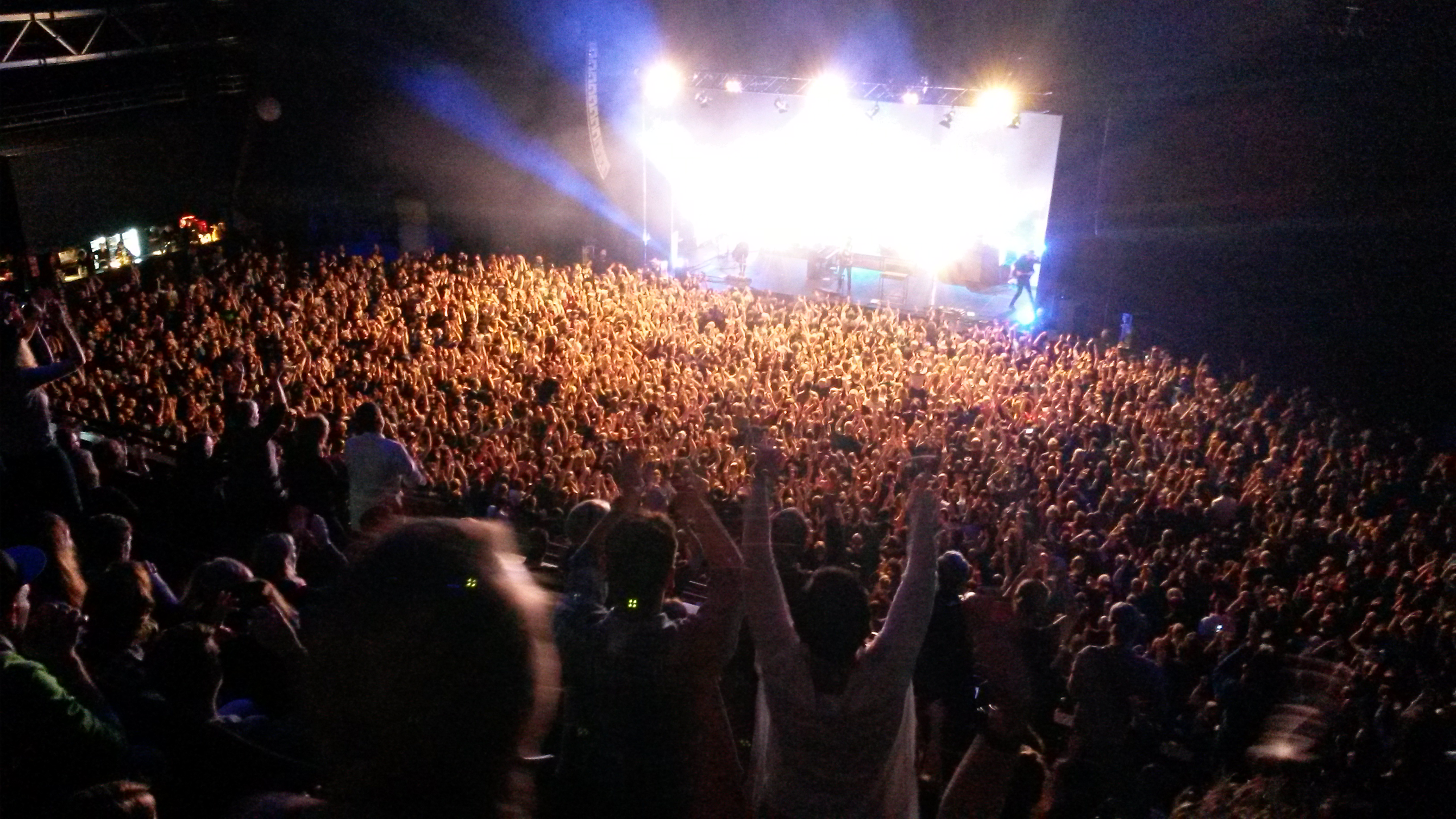 Rockkonzert im Mehr! Theater am Großmarkt, Hamburg